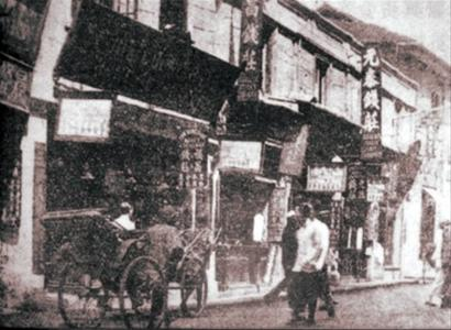 中文（中国大陆）: 早期老式石库门的代表兴仁里的旧照黄浦区宁波路120弄 兴仁里 老式石库门 1872年 砖木二层